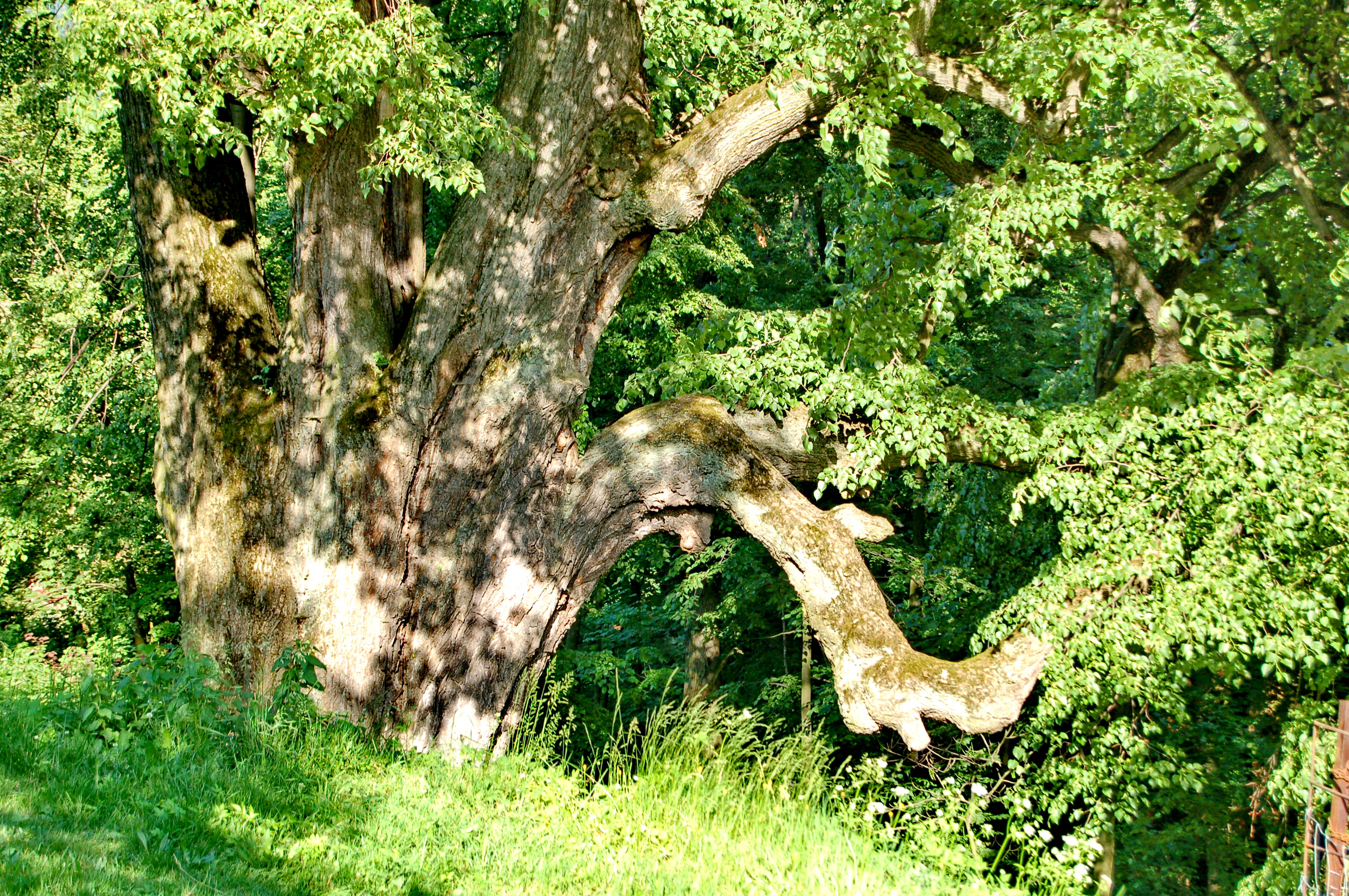 Hrádecká lípa